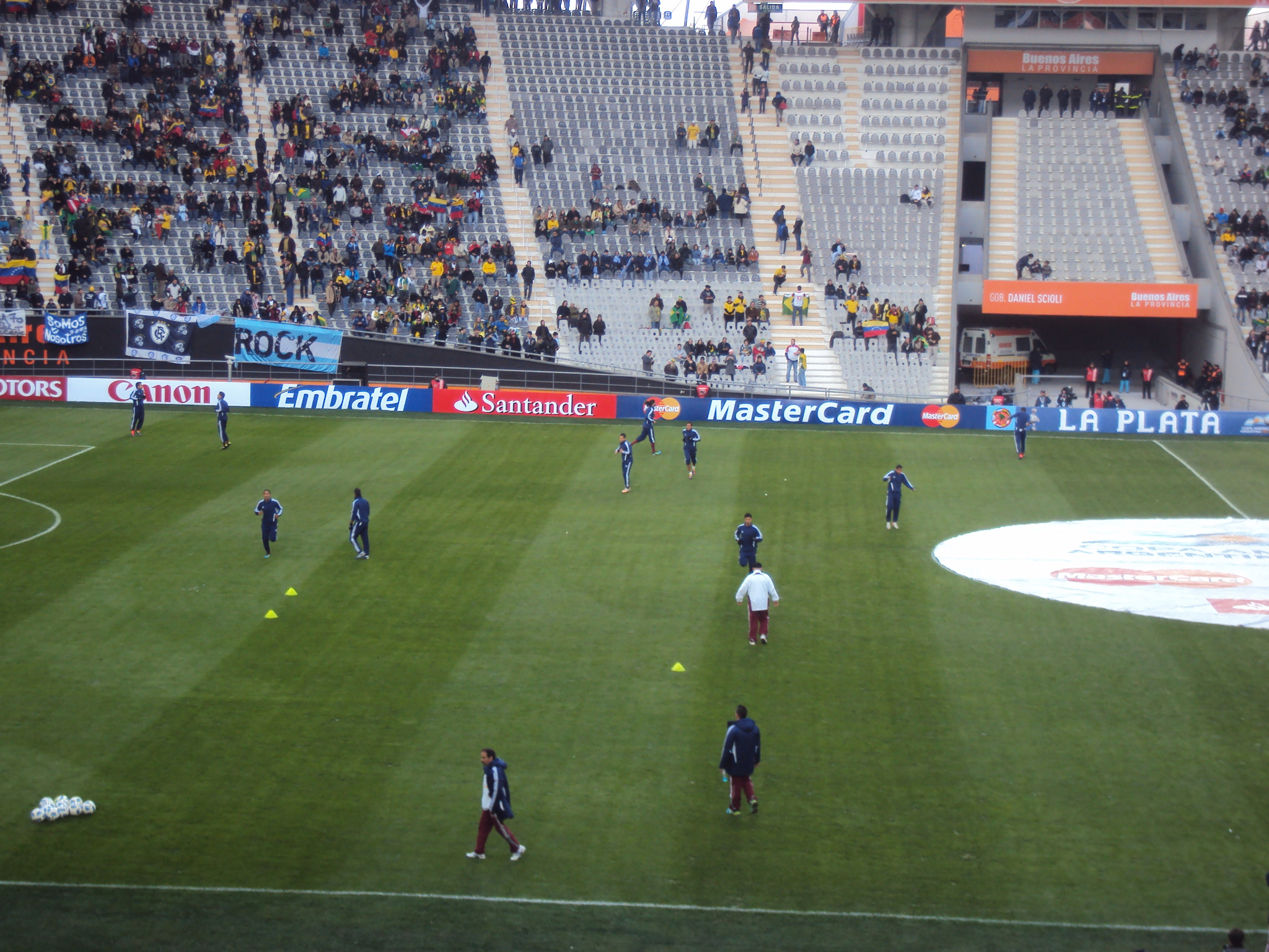 La Vinotinto vista desde lo alto del estadio la Plata